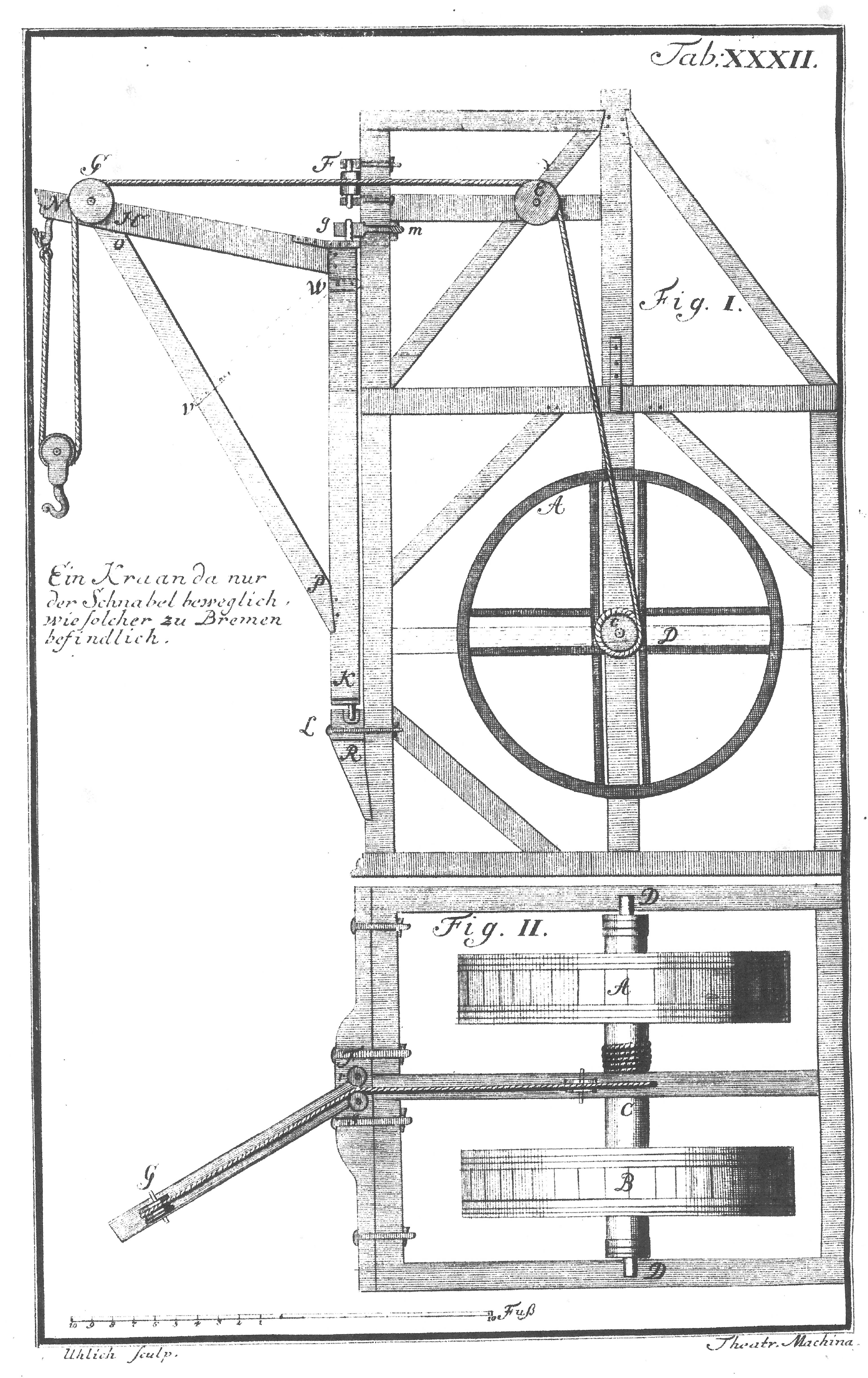 Hafenkran an der Schlachte zu Bremen, wohl 1684. Kupferstich in Jacob Leupold, Theatrum Machinarum, Bd. 4., Schau-Platz der Heb-Zeuge. Leipzig 1725.